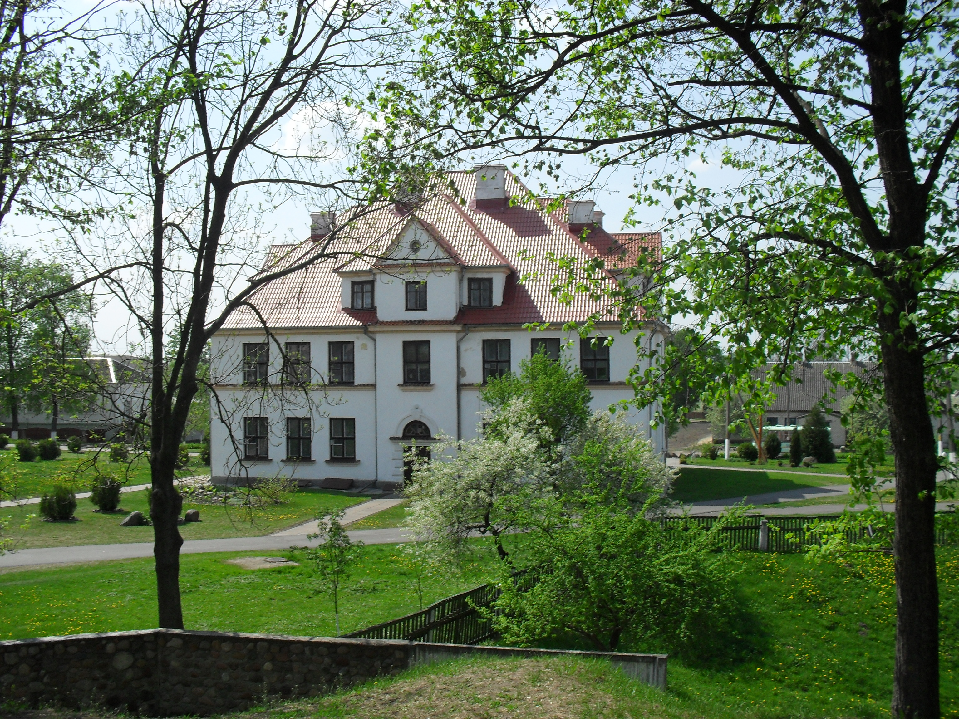 Будынак былой польскай школы. г. Камянец This is a photo of Belarusian heritage monument. Reference number: 113Г000322 ( WLM)